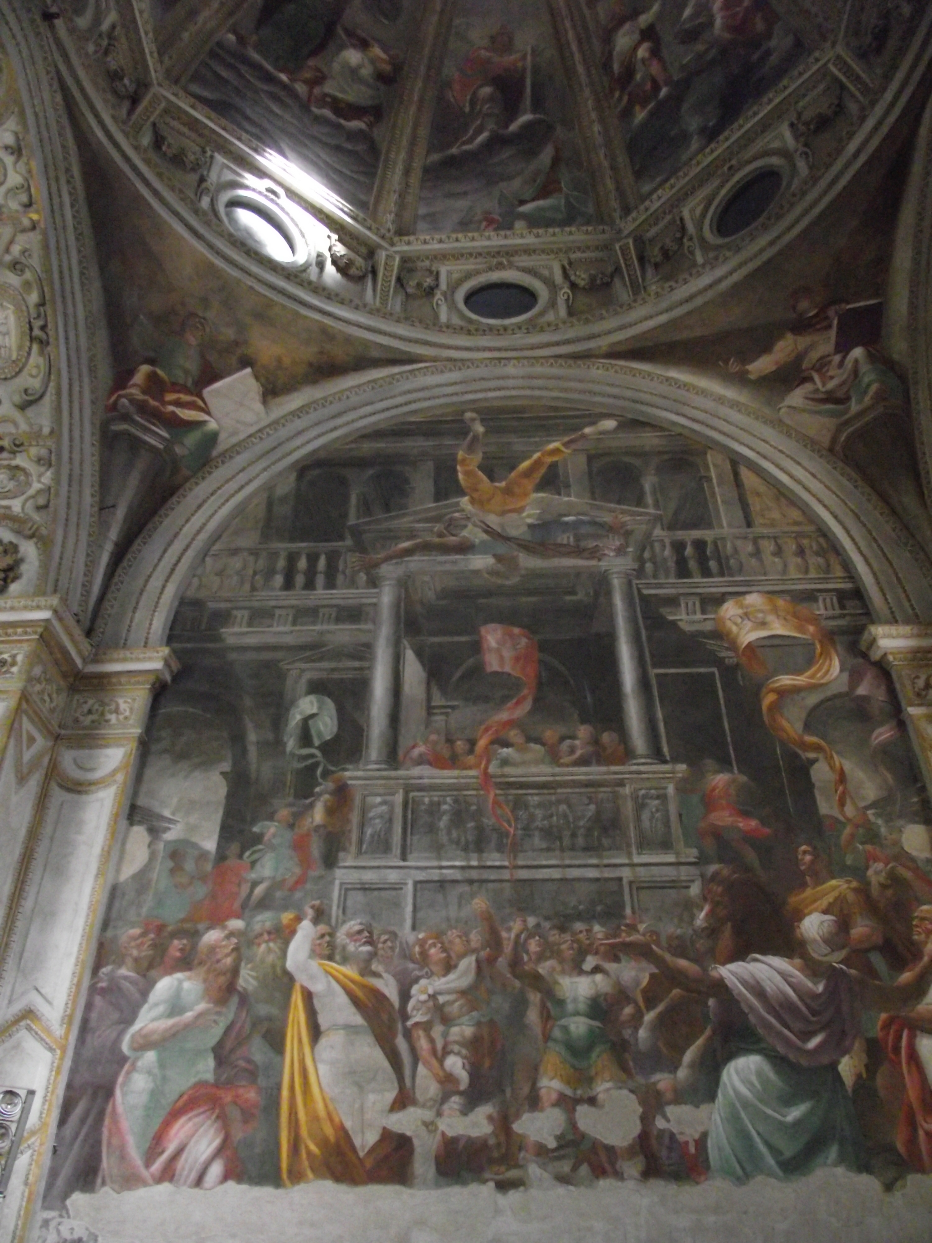 Cappella Foppa